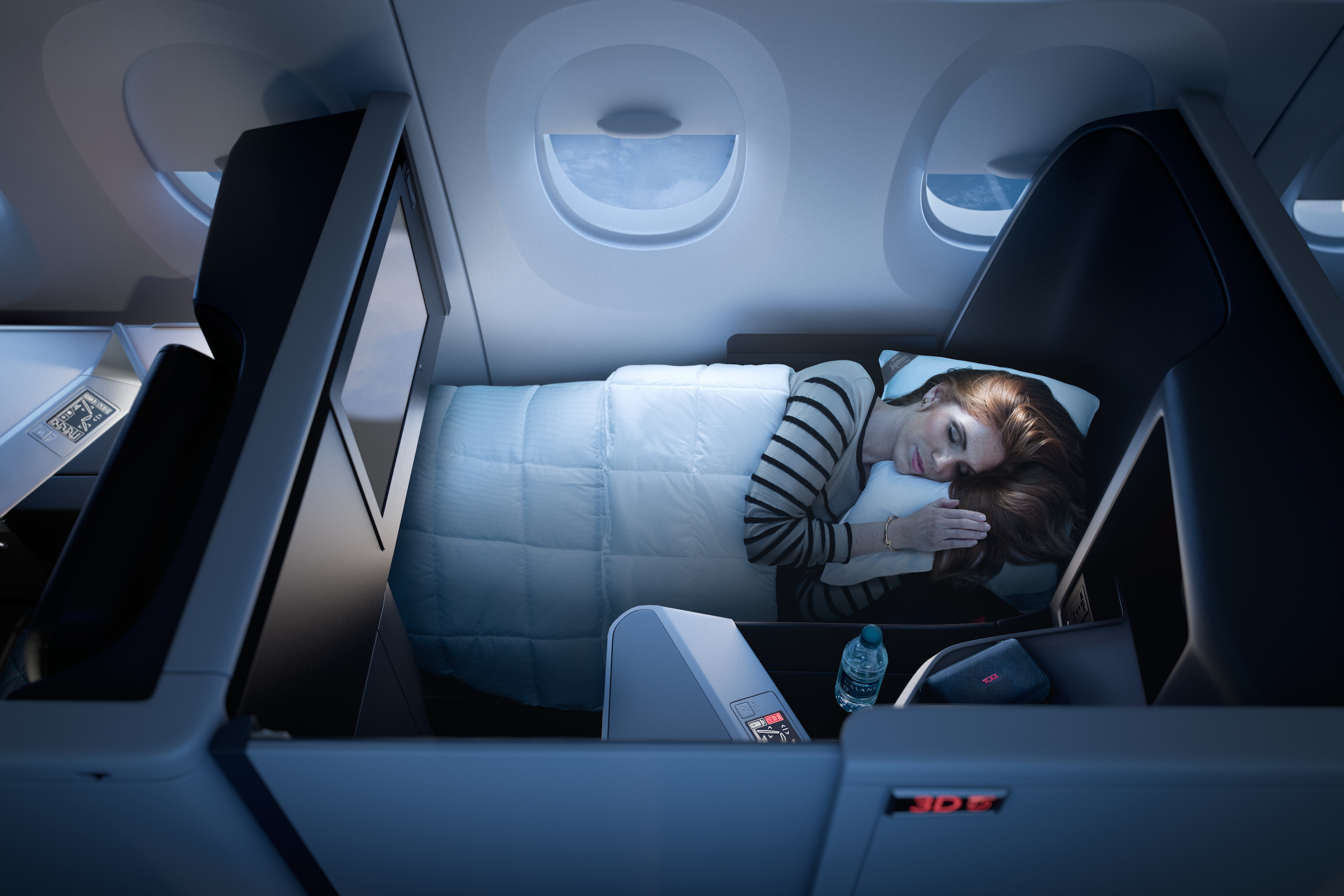 A350: Interior - Delta One suite